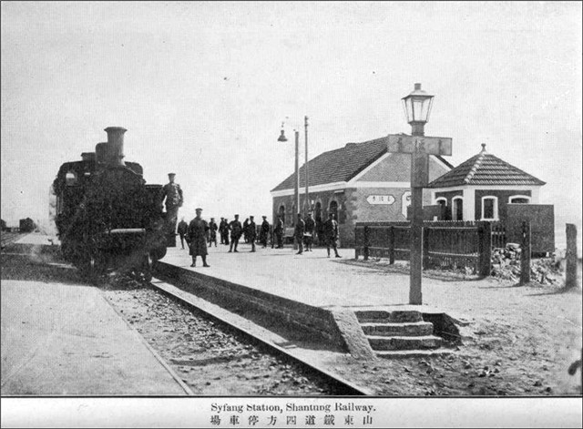 青岛四方火车站早期站房